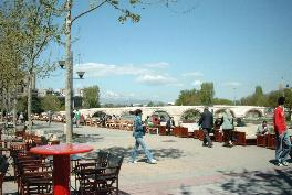 Skopje in 2005 old turkish bridge on Vardar River build by turks